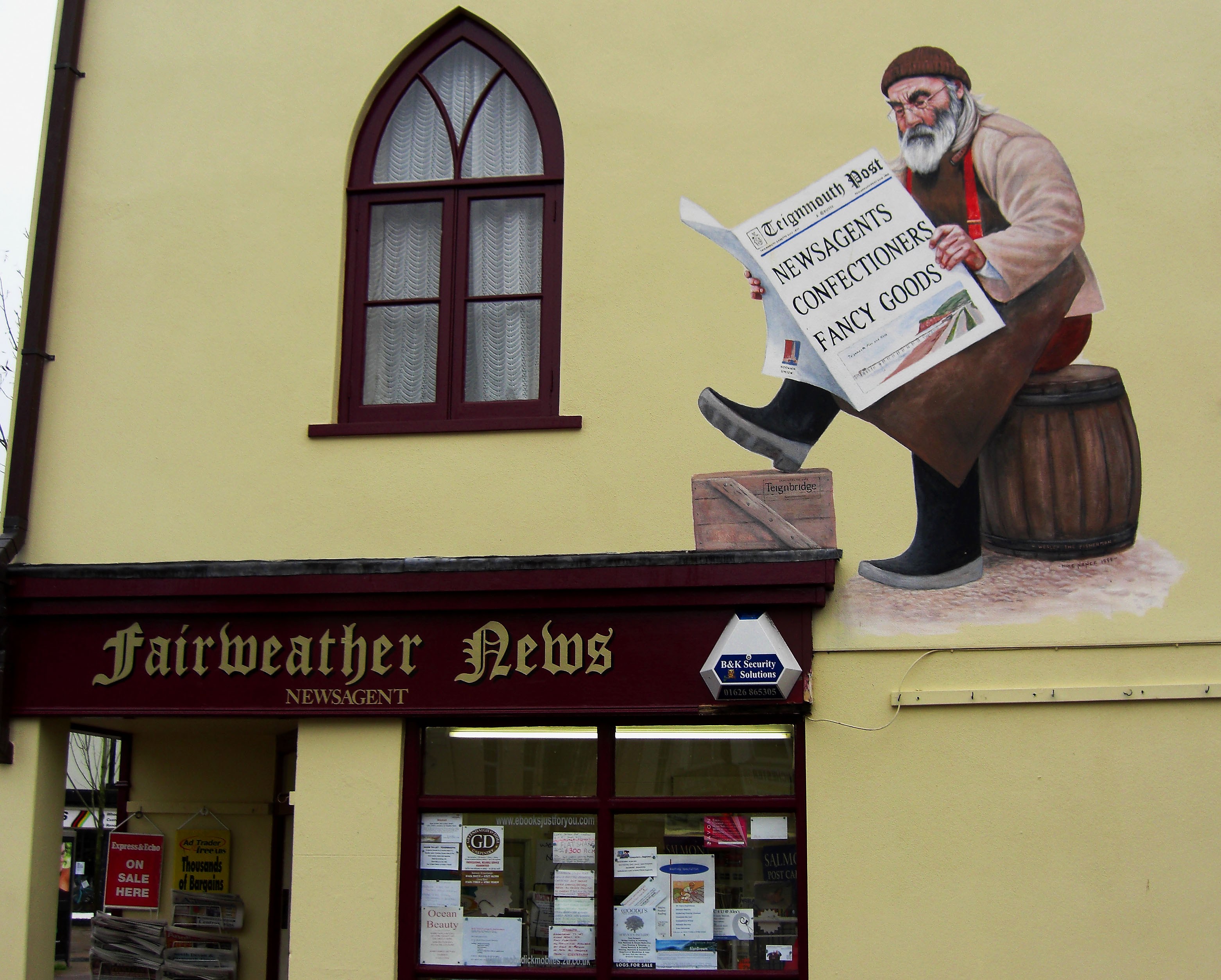 newsagent, Devon